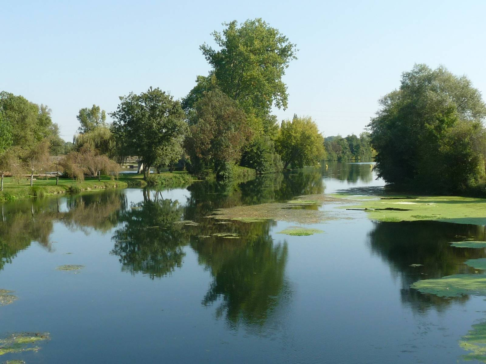 la Charente vue vers l'amont au moulin de Fleurac, Nersac (16), France